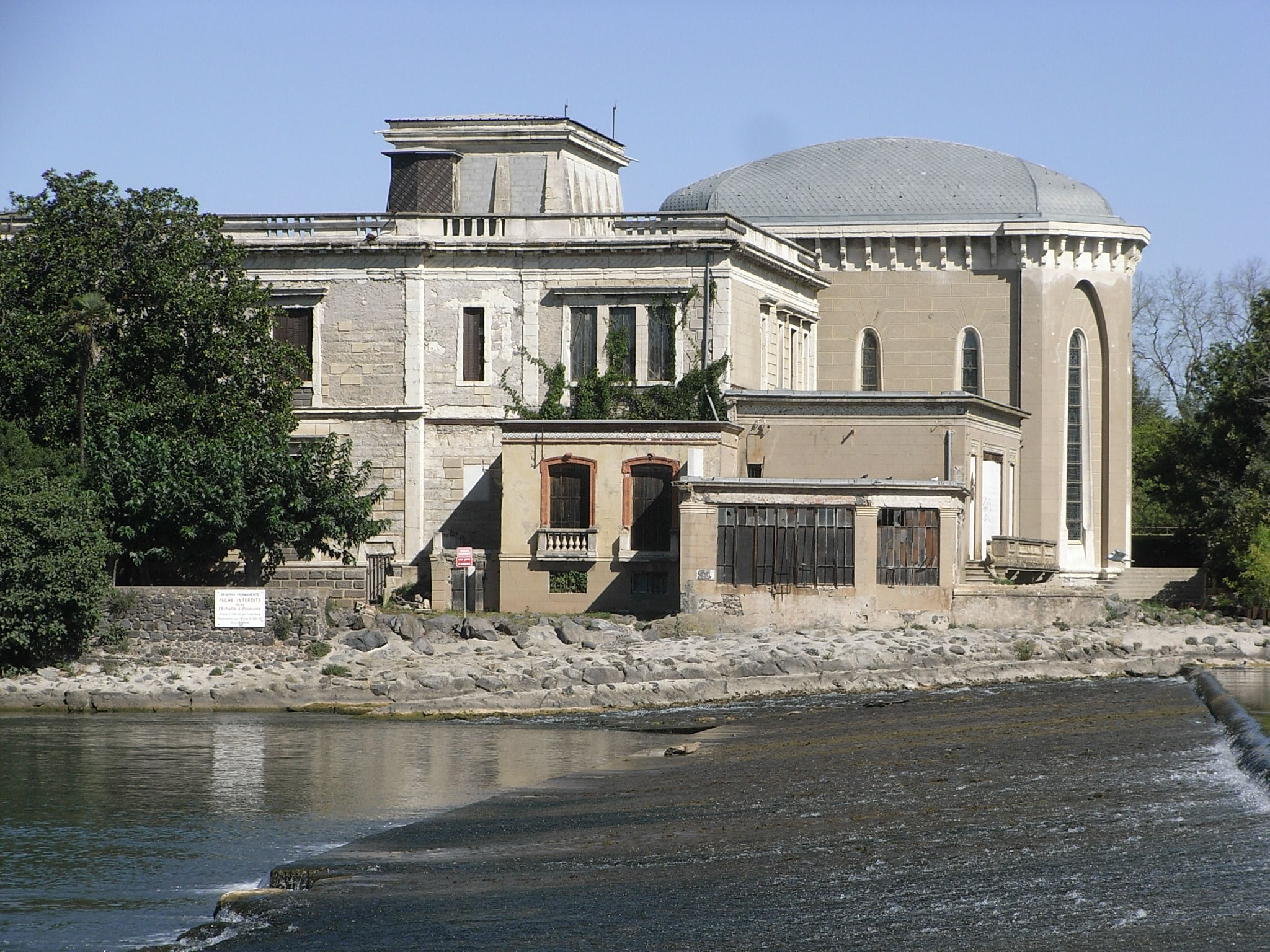 Le château Laurens à Agde (34) en France, construction de 1897 à 1901. Monument classé en 1996.